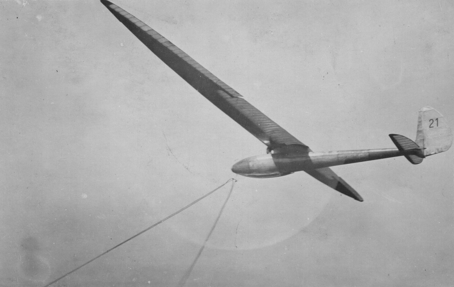 Die Akaflieg München Mü 3 Kakadu bei einem Gummiseil Start